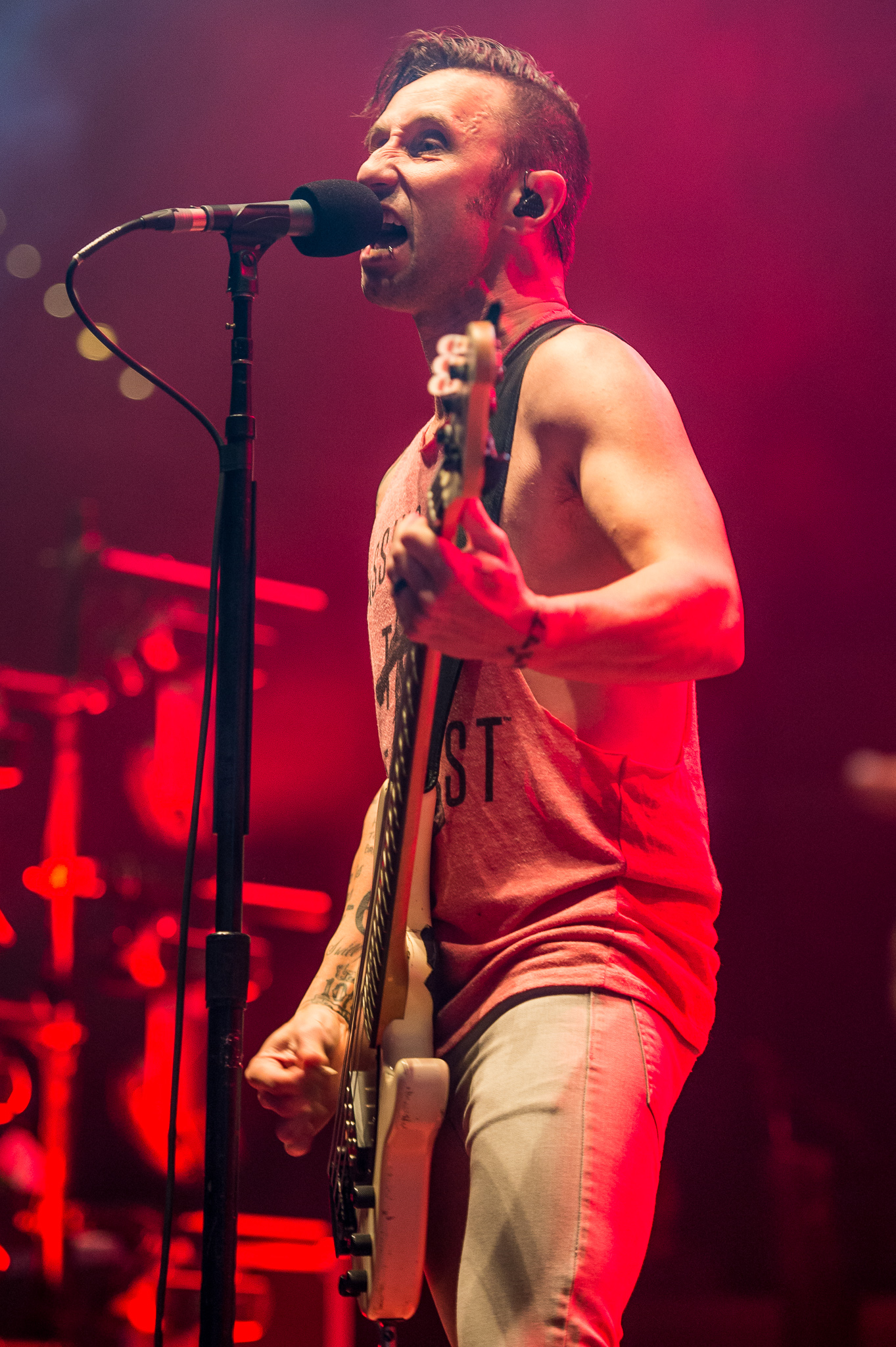 ARGO-Konzerte,Alternarena,Eric Bass,Festival,Konzert,Livekonzert,Livemusik,Musik,RiP,Rock im Park 2016,Shinedown